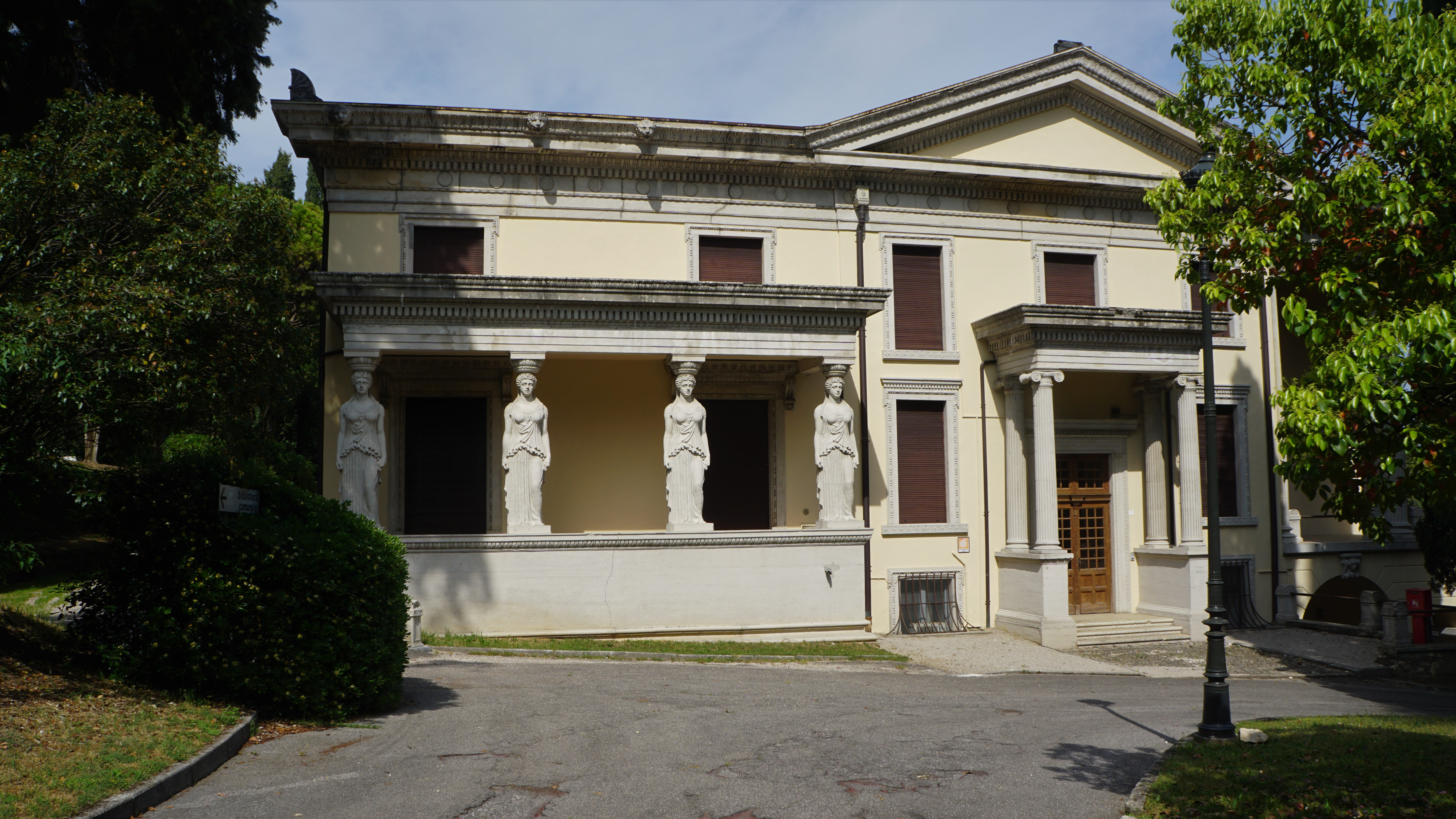 Villa Alba Gardone Riviera cariatidi riprese dall'eretteo dell'acropoli di Atene